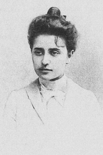 Татьяна Фёдоровна Шлёцер. Фото 1903 года